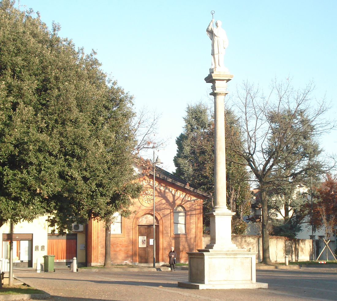 La bellissima chiesetta romanica di Sant'Apollinare in Cornaredo (MI)